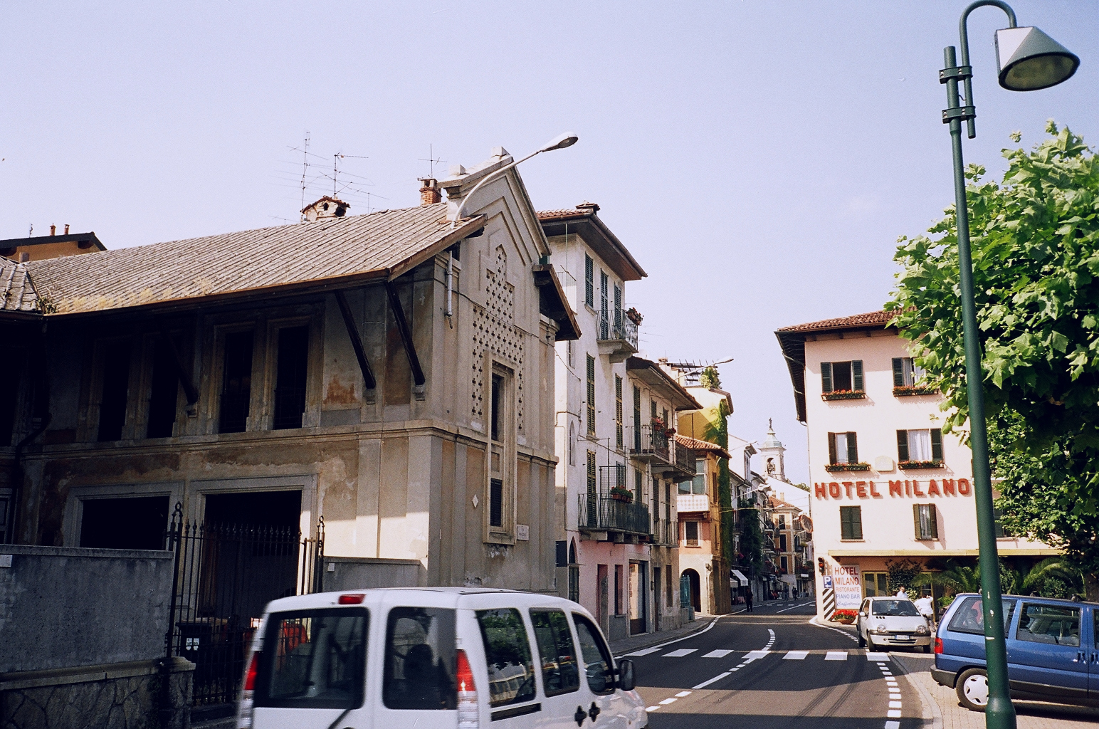 Belgirate, comune della prov. di Novara, sul Lago Maggiore, Italia. Via Mazzini.